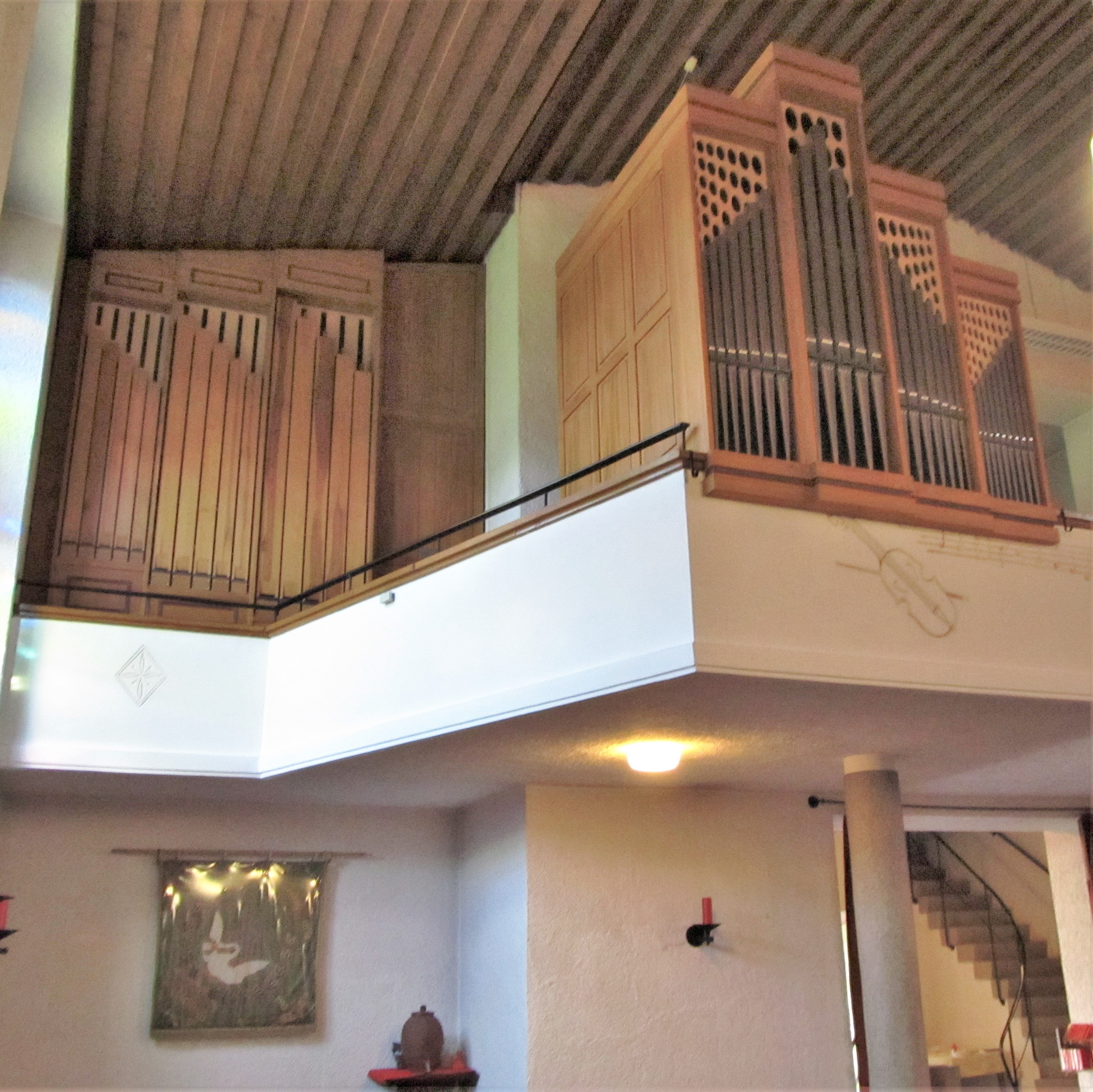 Orgelprospekt der katholischen Marienkirche in Alschbach, einem Stadtteil von Blieskastel, Saarland